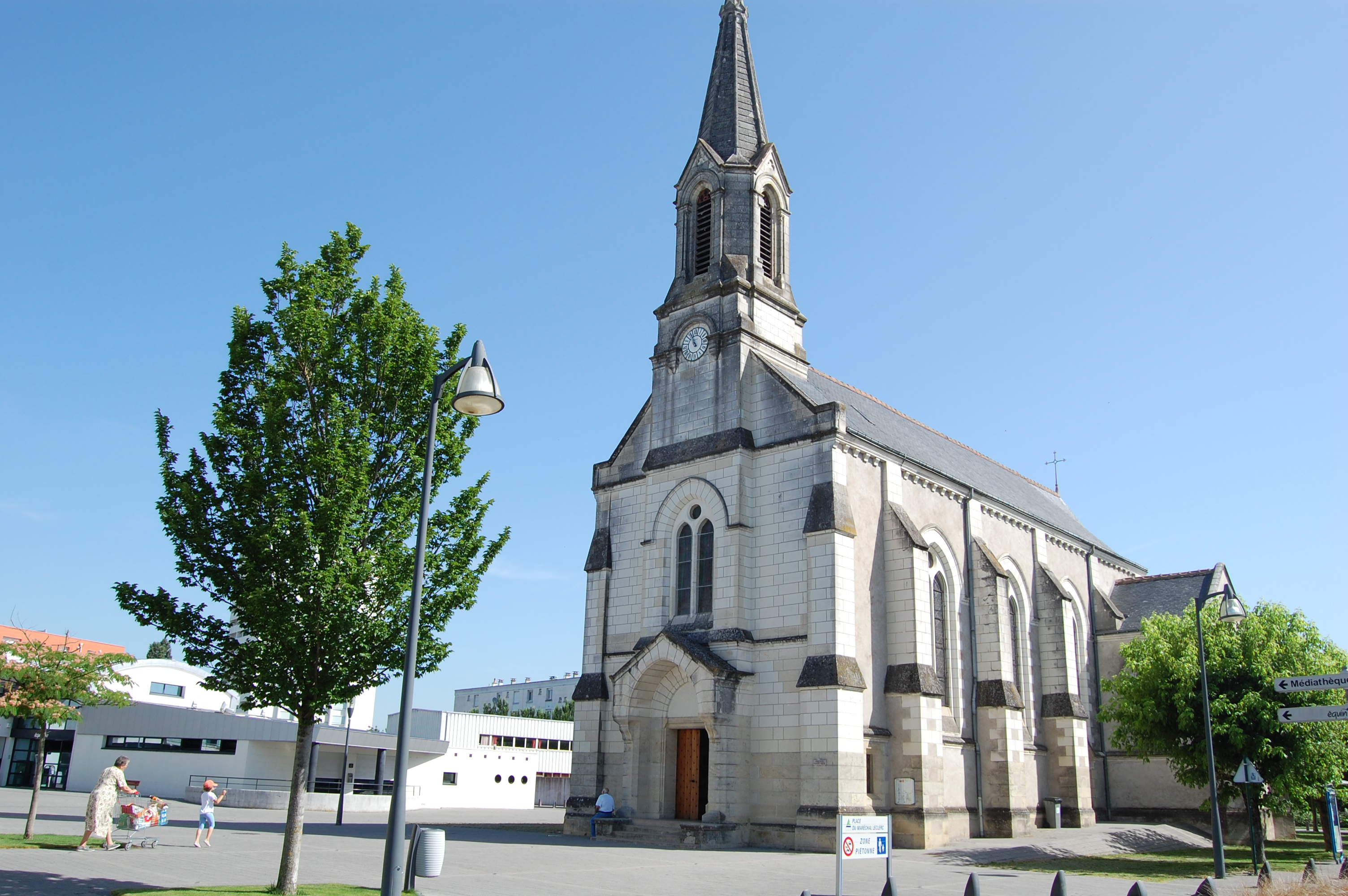 Église de La Riche (37520)